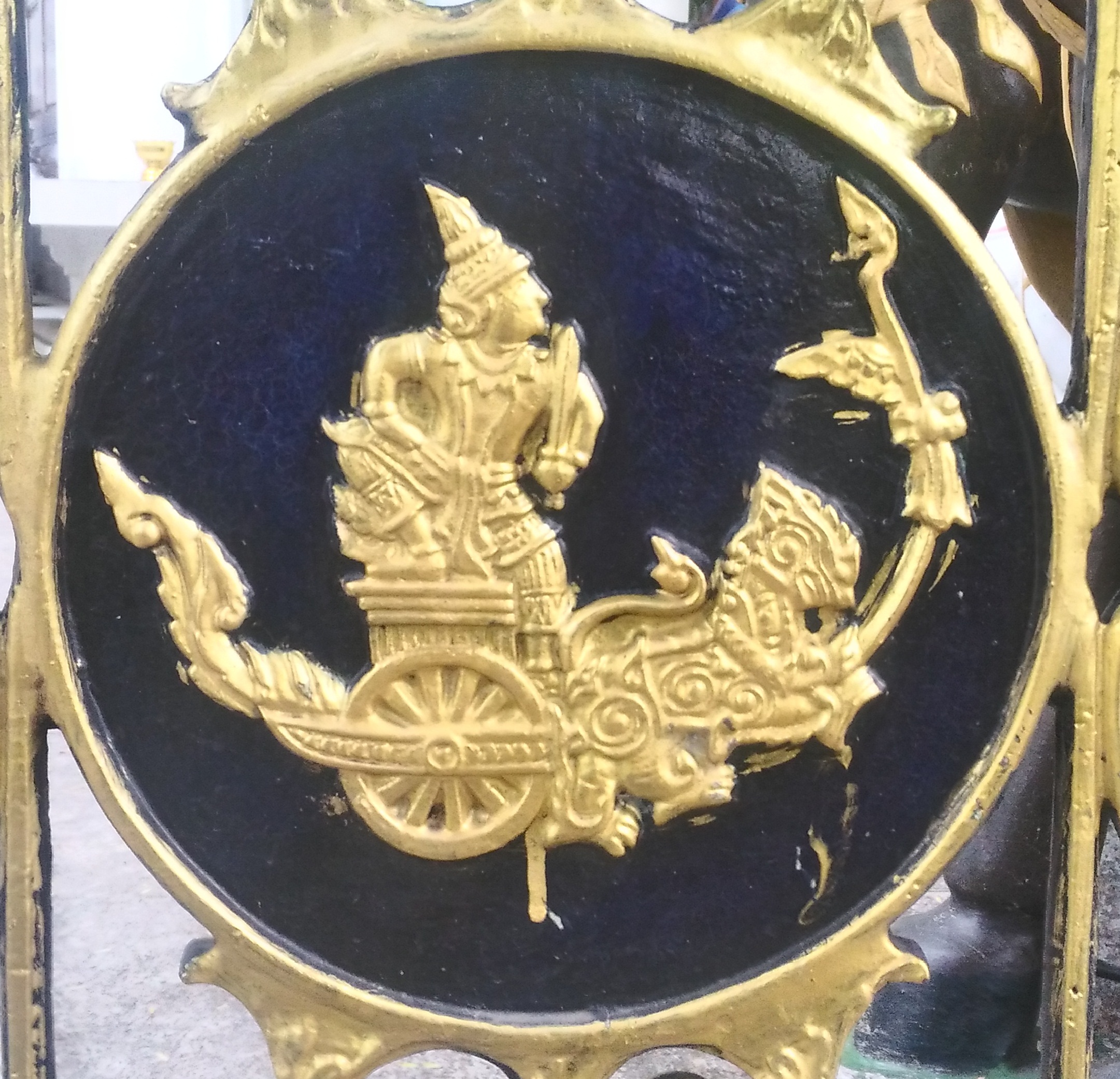 พระอนุสาวรีย์นายพลเรือเอก พระเจ้าบรมวงศ์เธอ พระองค์เจ้าอาภากรเกียรติวงศ์ กรมหลวงชุมพรเขตอุดมศักดิ์ ณ มหาวิทยาลัยเทคโนโลยีราชมงคลพระนคร ศูนย์พณิชยการพระนคร (วังนางเลิ้งเดิม) ถนนพิษณุโลก เขตดุสิต กรุงเทพมหานคา